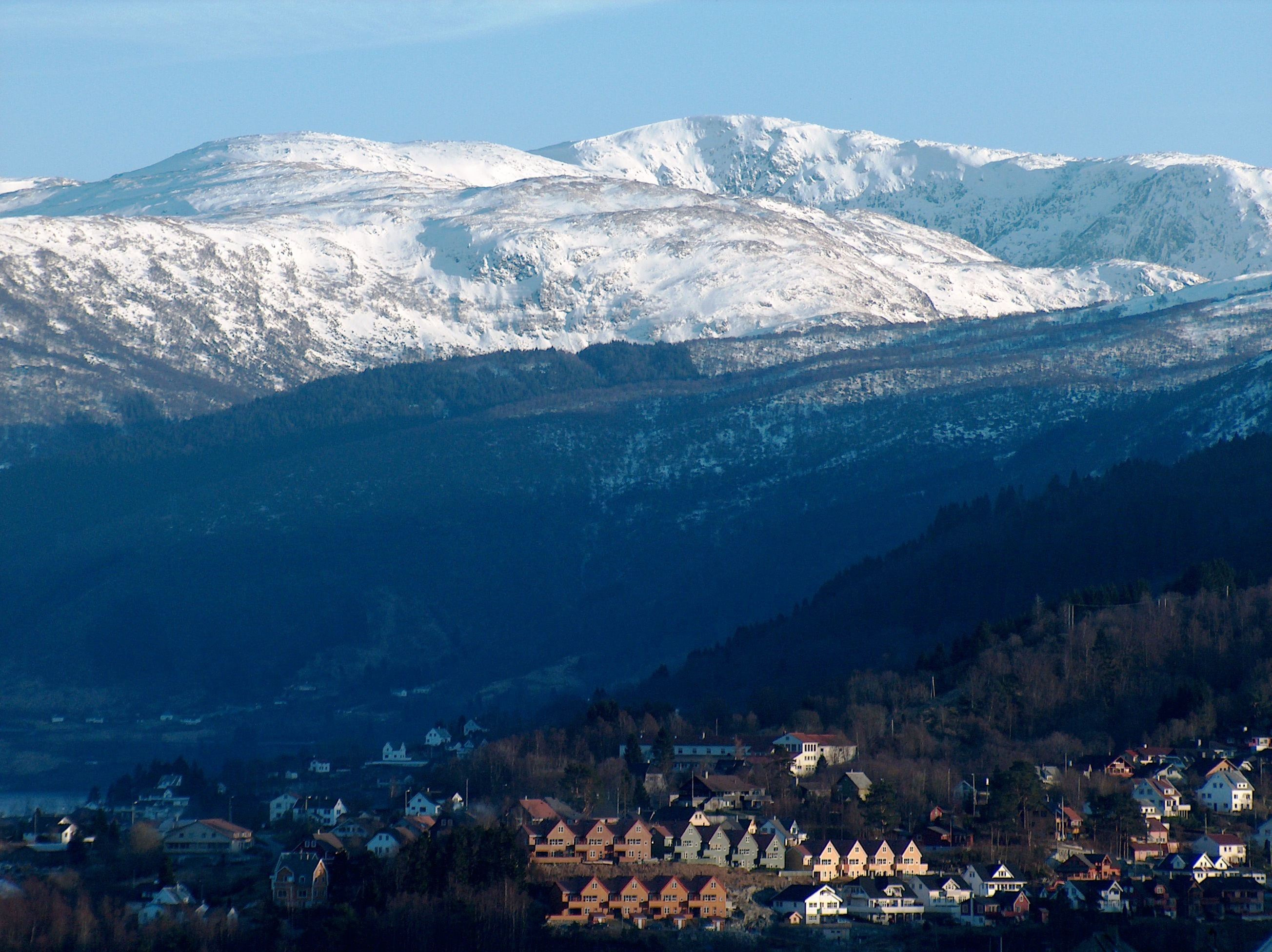 Gulfjellet, Bergen in Norway.